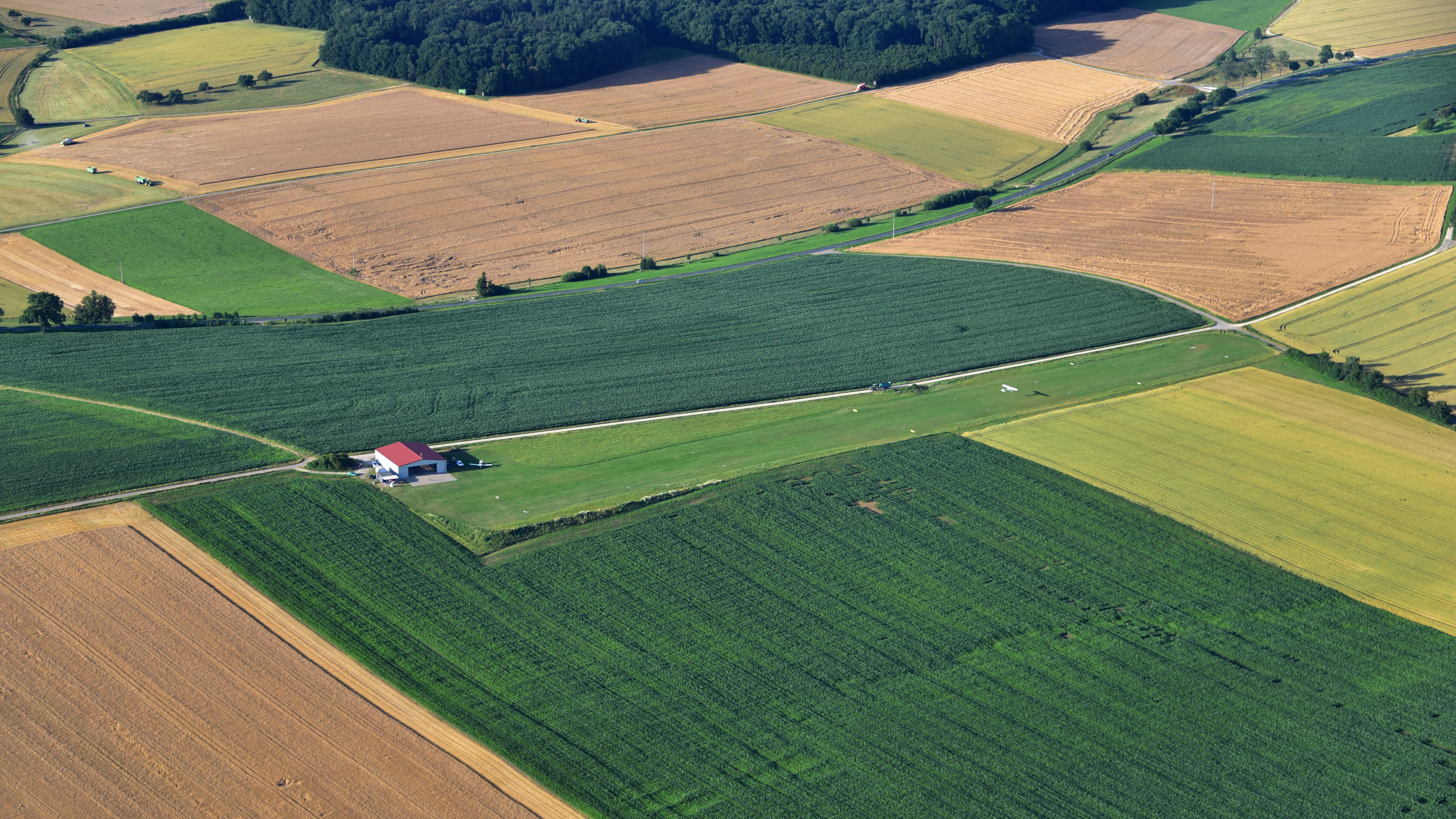 Flugplatz Geilsheim, Luftaufnahme (2016)